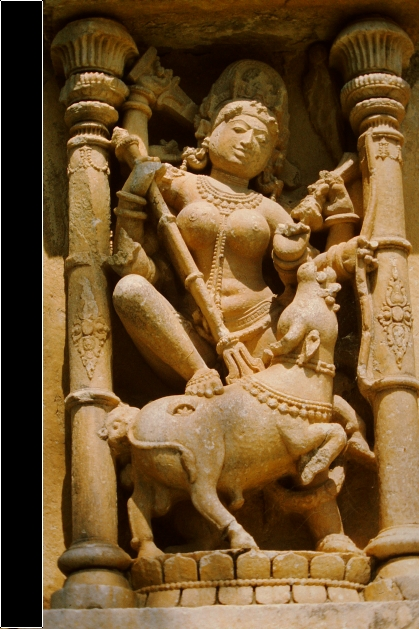 Ambika-Tempel (Jagat), Durga 2